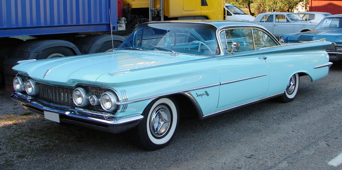 Oldsmobile Super 88 1959, Sweden